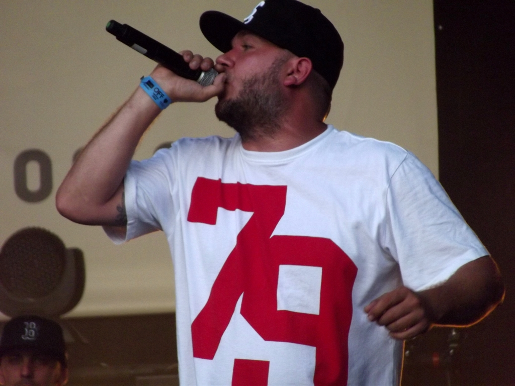 Zdjęcie zrobione podczas OFF Festival 2013 w katowickiej Dolinie Trzech Stawów.